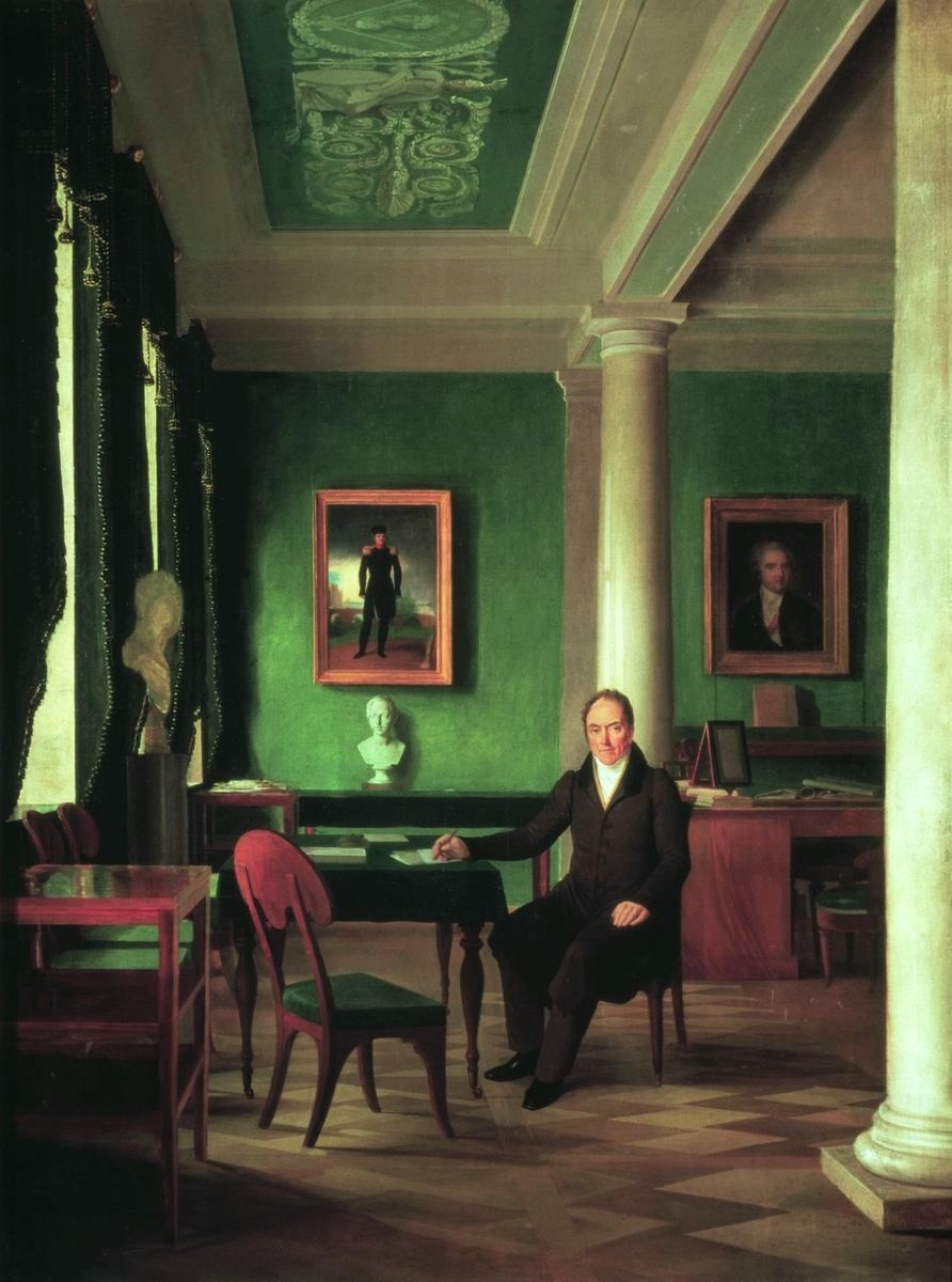 не окончен